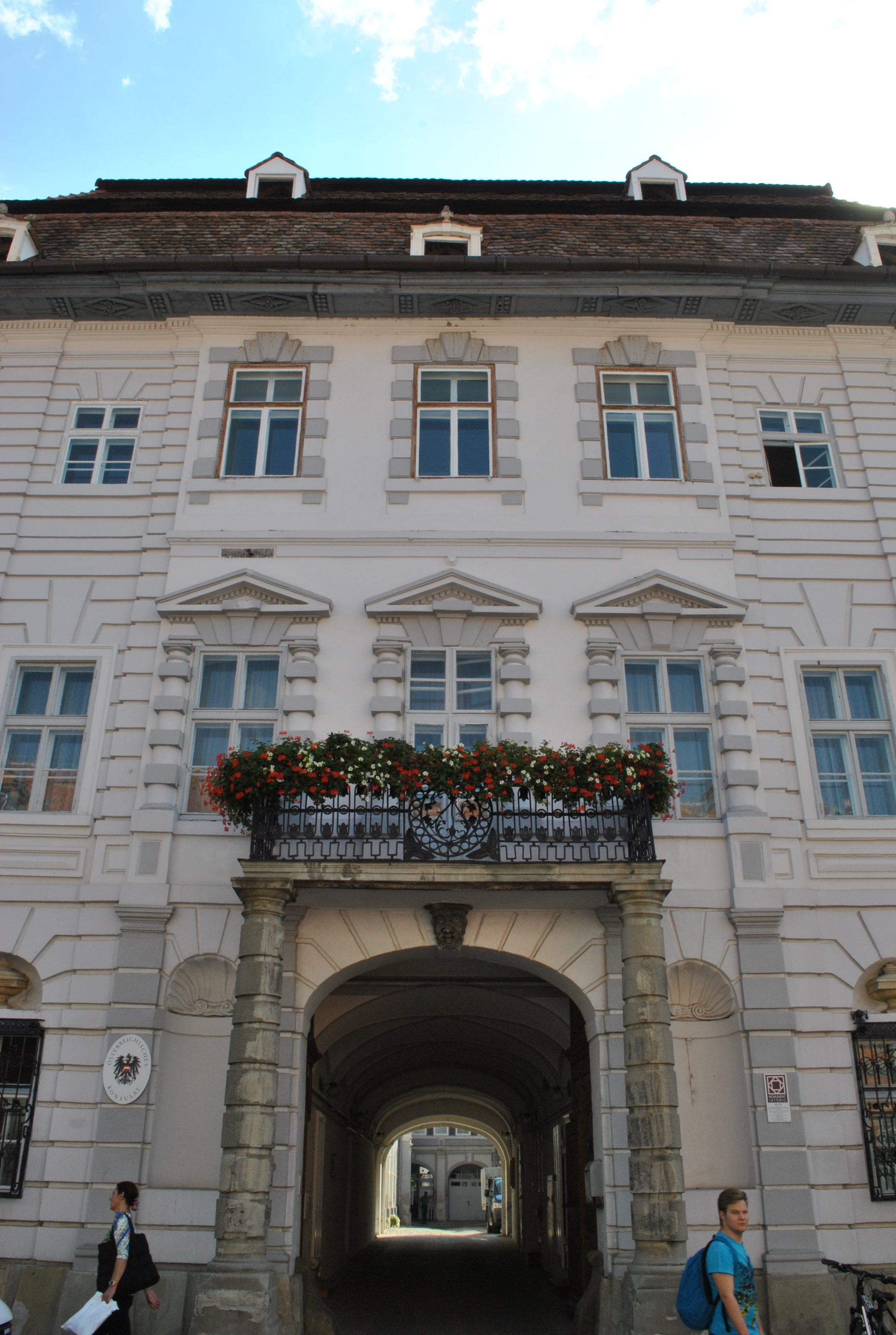 Casa Filek, azi sediul Consistoriului Superior al Bisericii Evanghelice C. A. din România, 1802